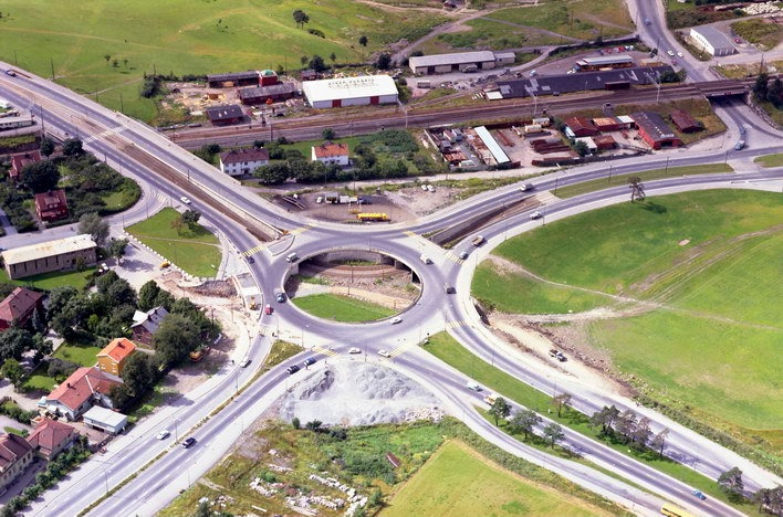 Sinsenkrysset roundabout in Oslo, Norway